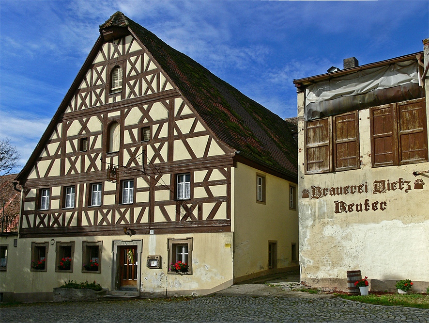 Unternbibert, Gemeinde Rügland, Bayern Hauptstraße 17, Gasthaus und Brauerei, 1716This is a photograph of an architectural monument.